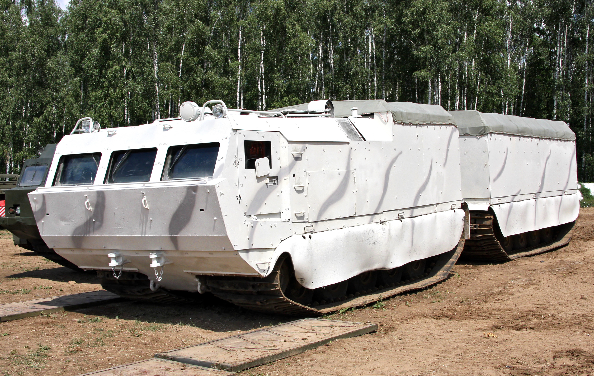 Двухзвенный гусеничный транспортер модернизированный ДТ-10ПМ (Tracked carrier DT-10PM)